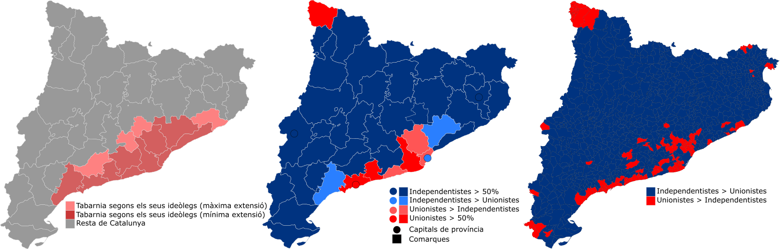 Mapes amb l'ubicació de Tabarnia segons els seus ideòlegs (a l'esquerra); mapa de vot independentista-unionista per comarca (al centre) i mapa de vot independentista-unionista per municipi (a la dreta)